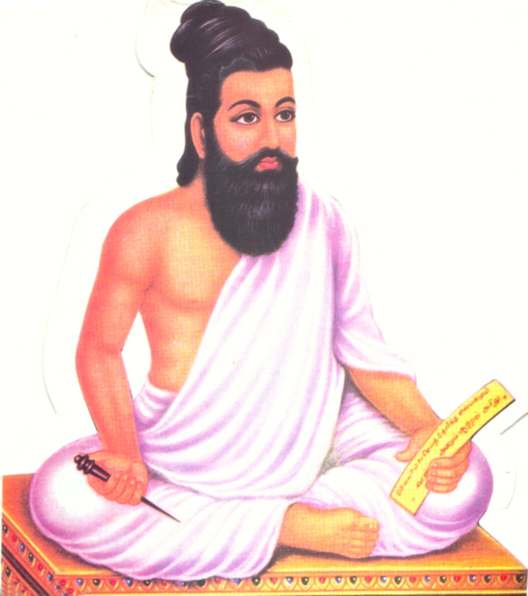 இவர் திருவள்ளுவர் ஆவார். இவர் திருக்குறளை இயற்றினார்.